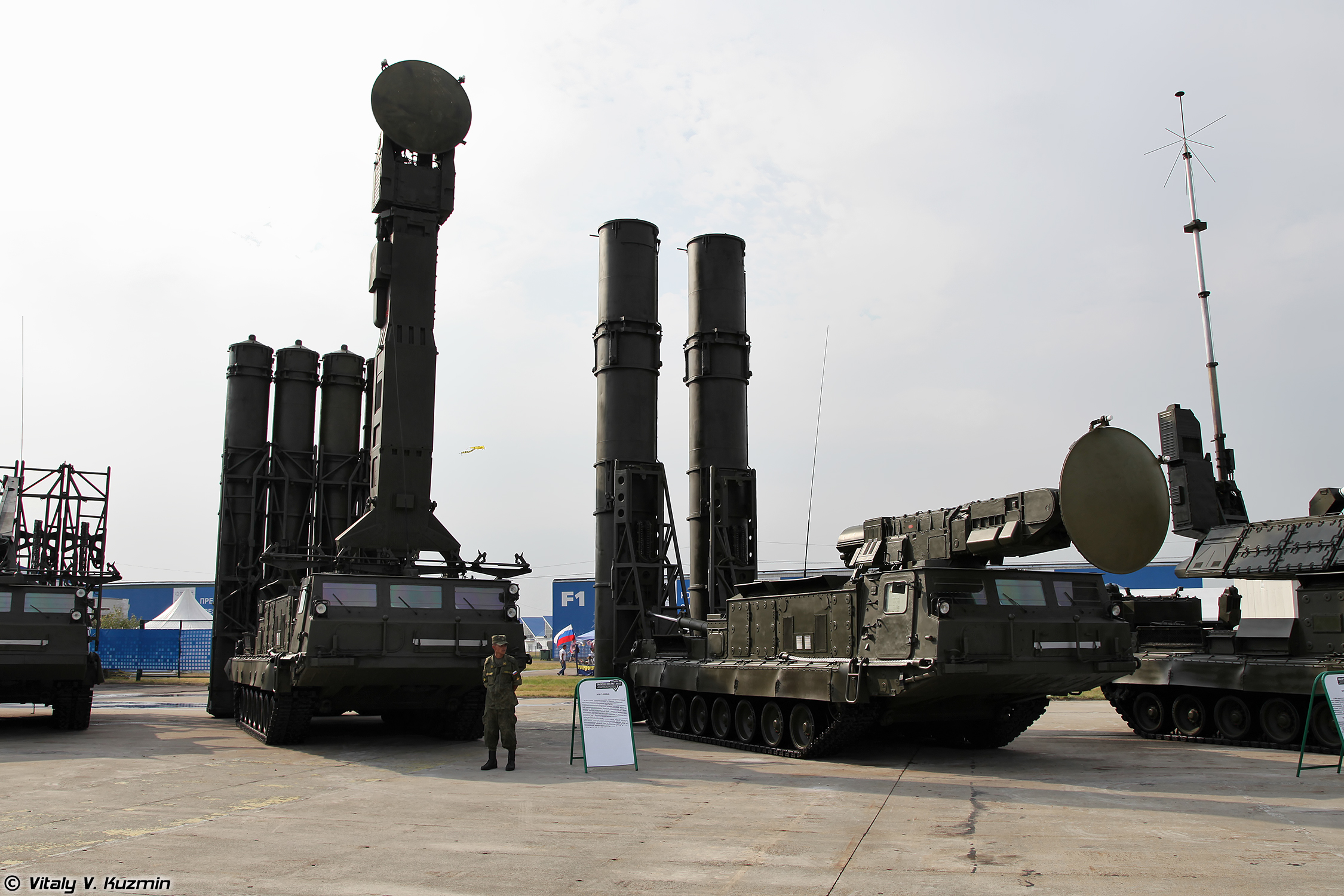 Пусковые установки 9А83 и 9А82 из состава ЗРС С-300В (9A83 and 9A82 TELAR from S-300V)